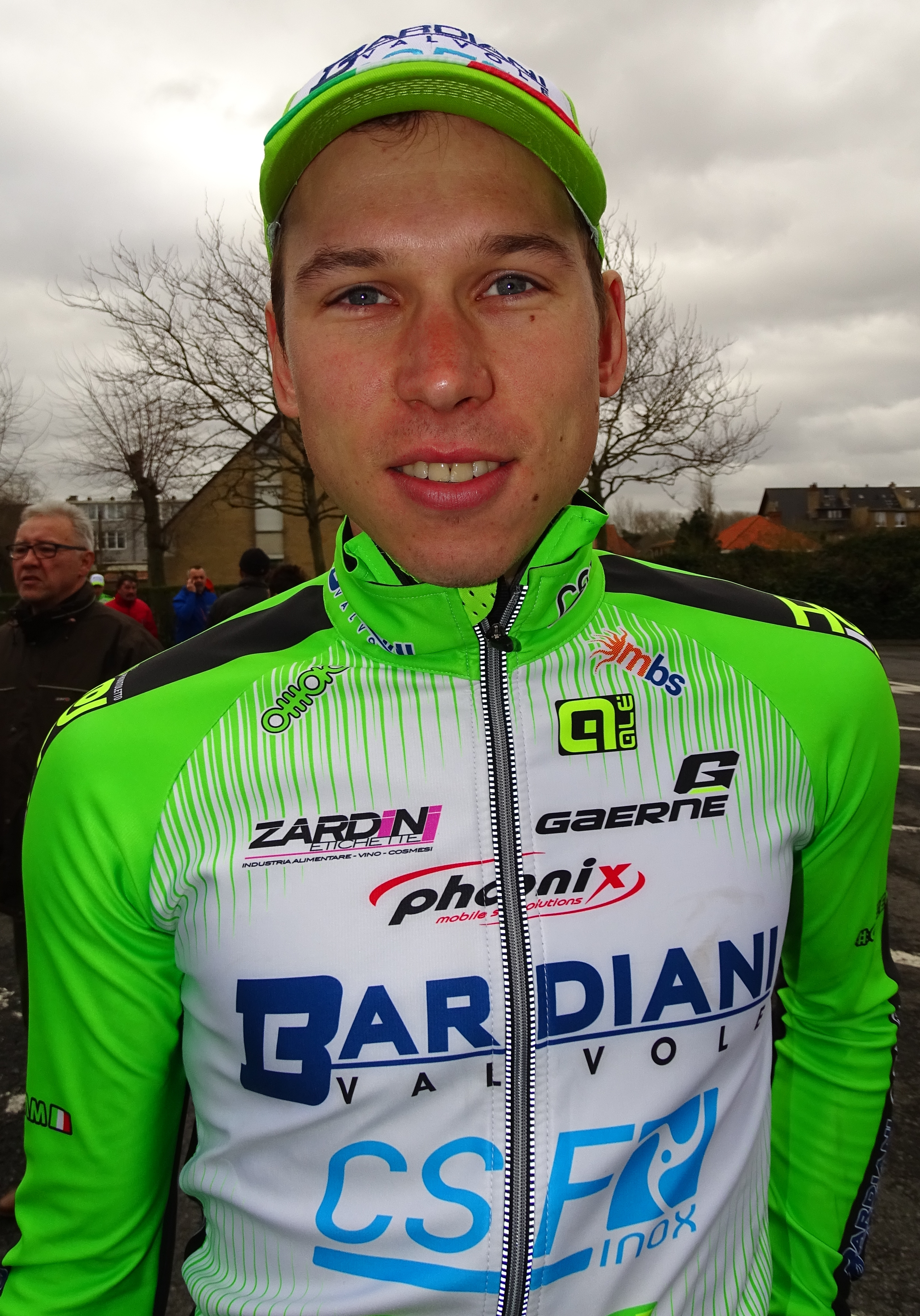 Reportage réalisé le mardi 31 mars à l'occasion de du départ de la première étape des Trois jours de La Panne 2015 à La Panne, Belgique.